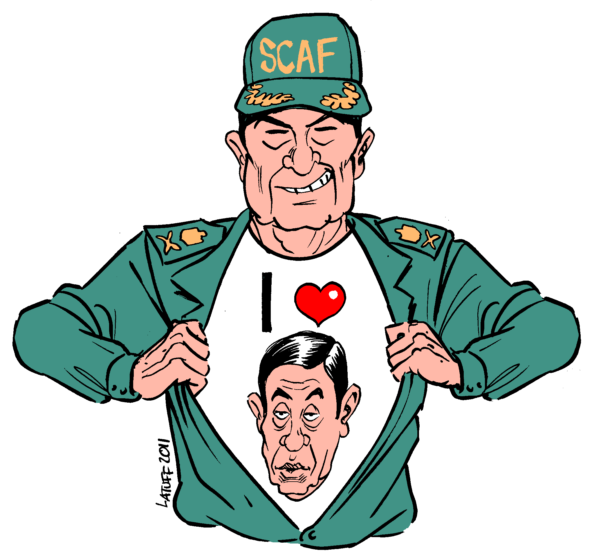 عبد المجيد محمود